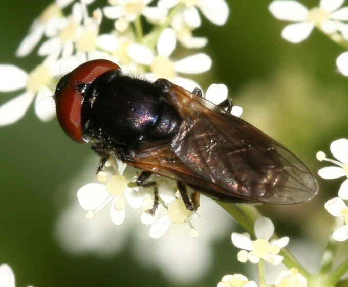 Vernacular names